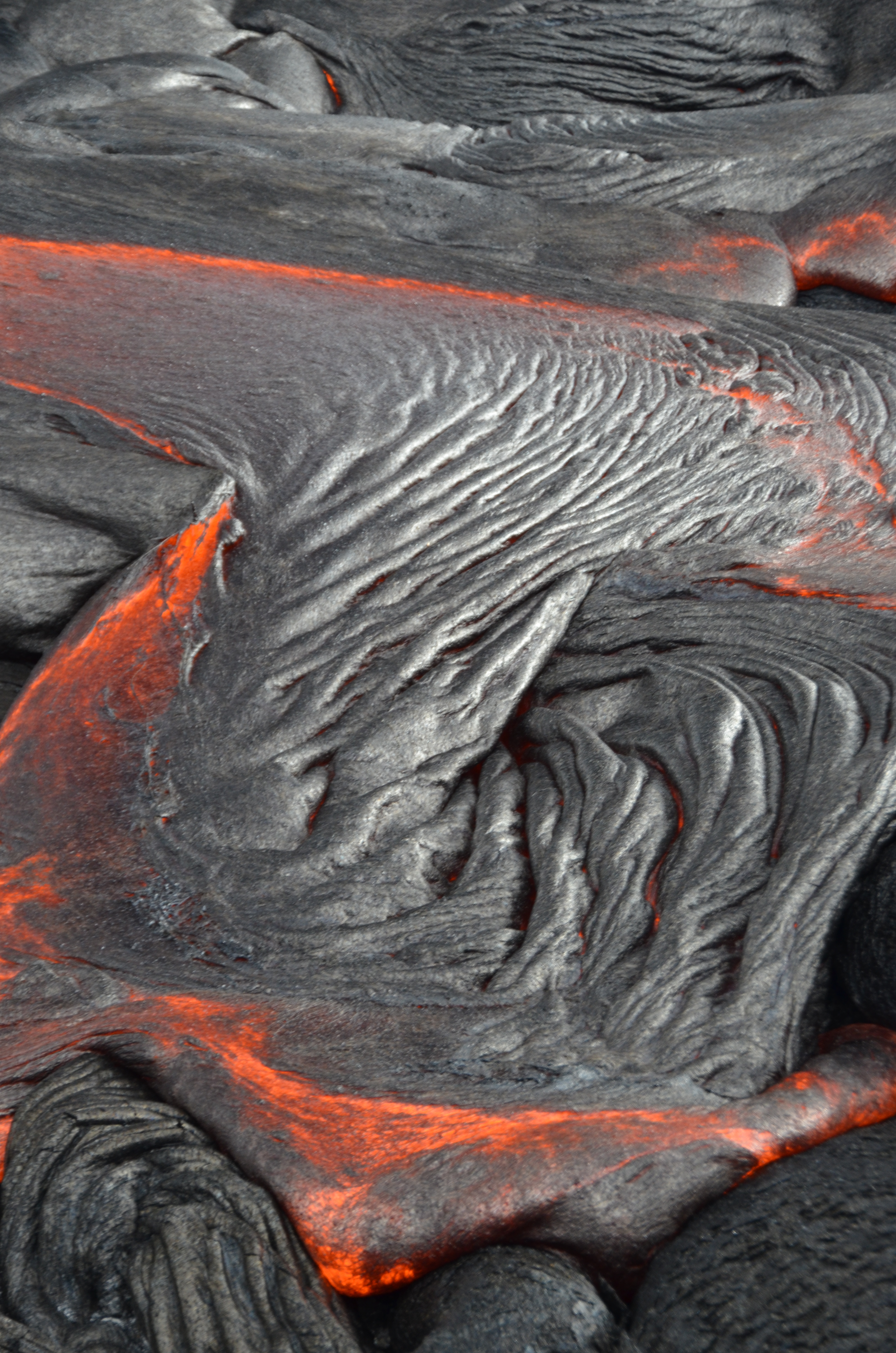 Pele